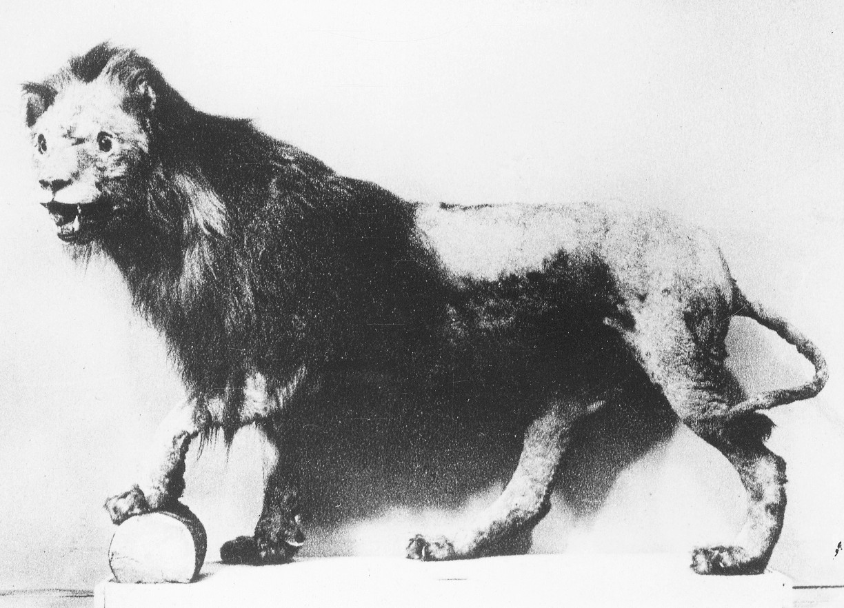 Lejonslättens lejon, uppstoppat. Det sista lejonet från Djurgården som sköts 1792 och stoppades upp, finns idag på Naturhistoriska Riksmuseet.